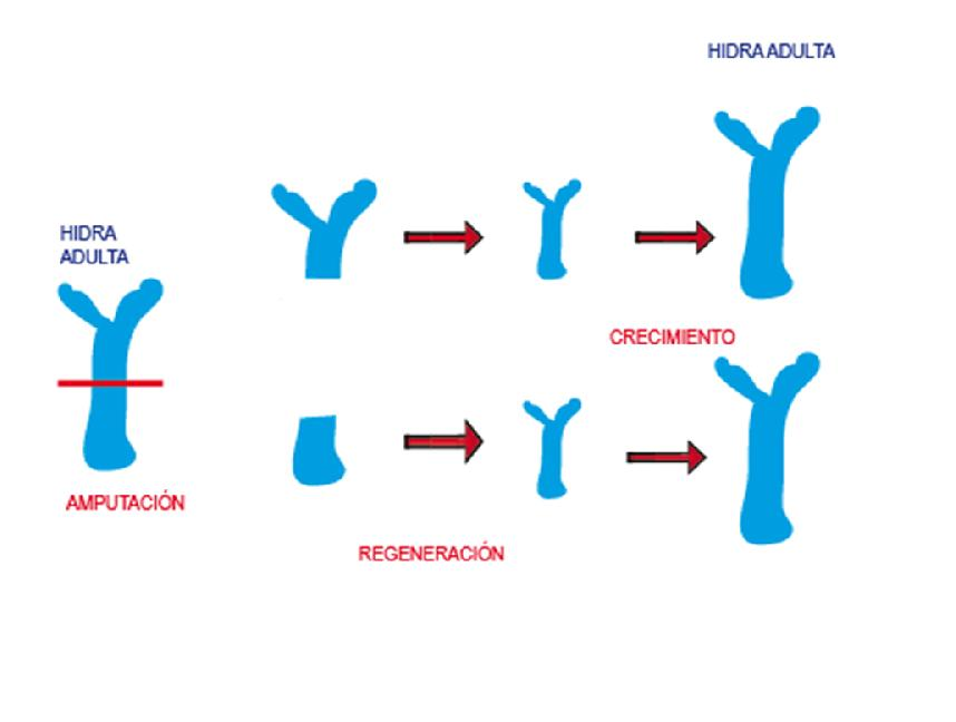 Regeneracion y crecimiento en Hidras